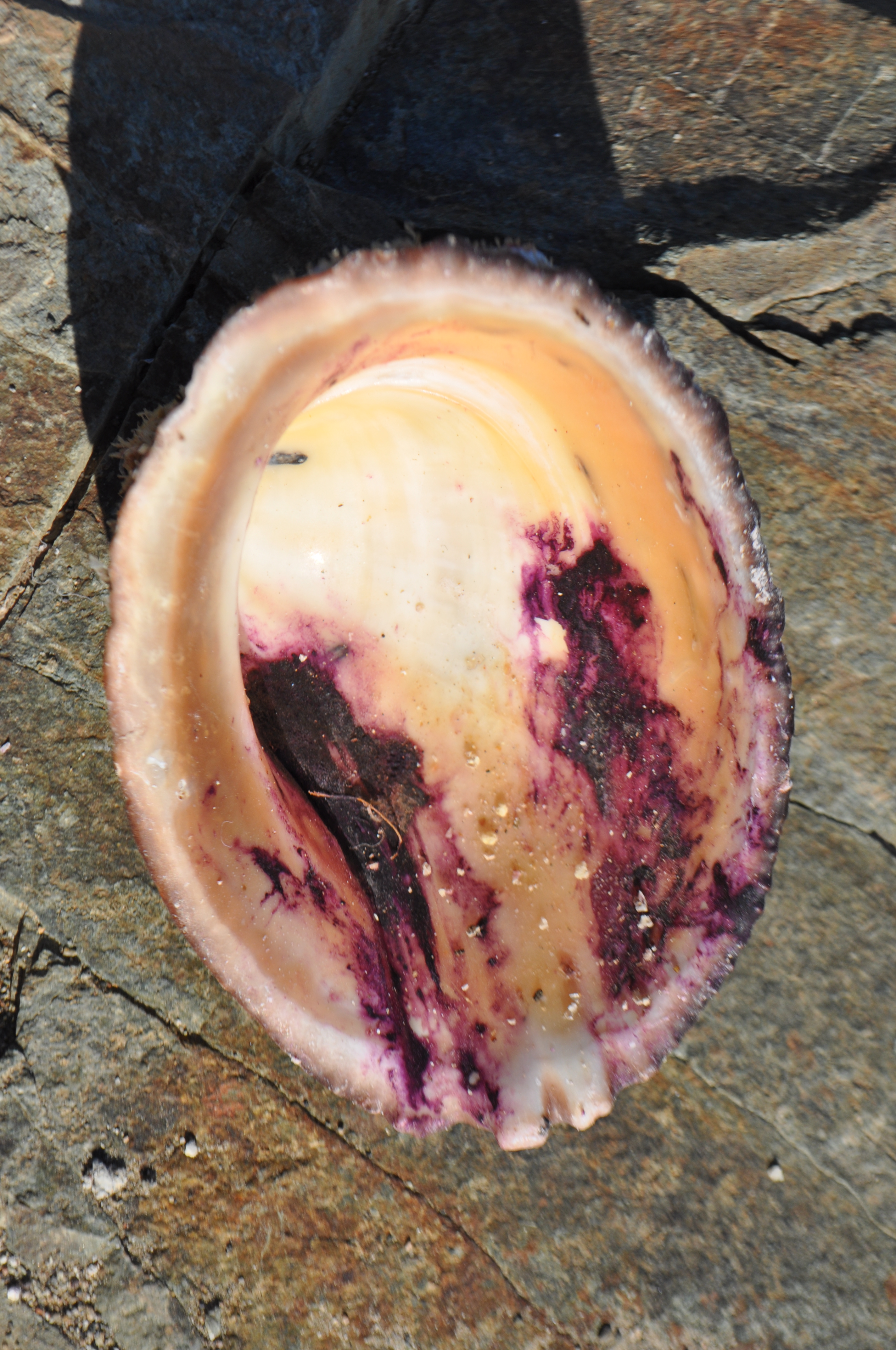 Concha de loco con restos de su sangre. El color azulado (morado) se debe a la Hemocianina.